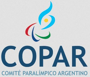 Simil Logo del Comité Olímpico Argentino